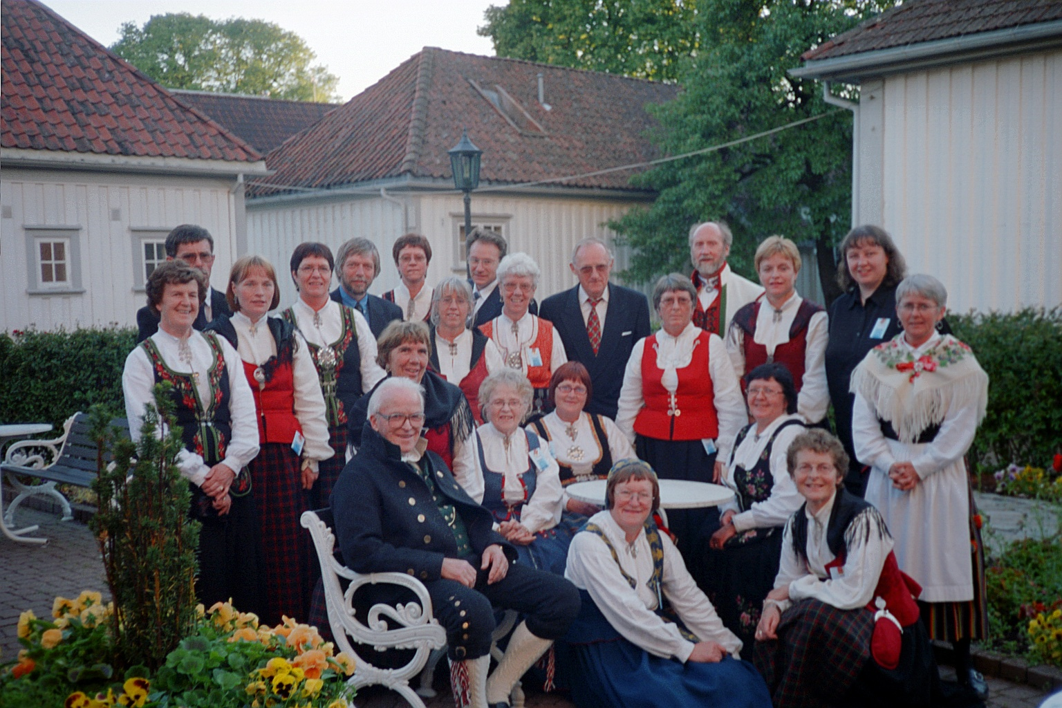 Alvdal Blandetkor under Nordisk-Baltisk Korfestival juni 2000 i Skien.